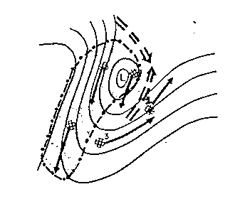 Exemple de circulation d'altitude et de position de la dépression de surface ainsi que leur direction de déplacement selon la technique de George.